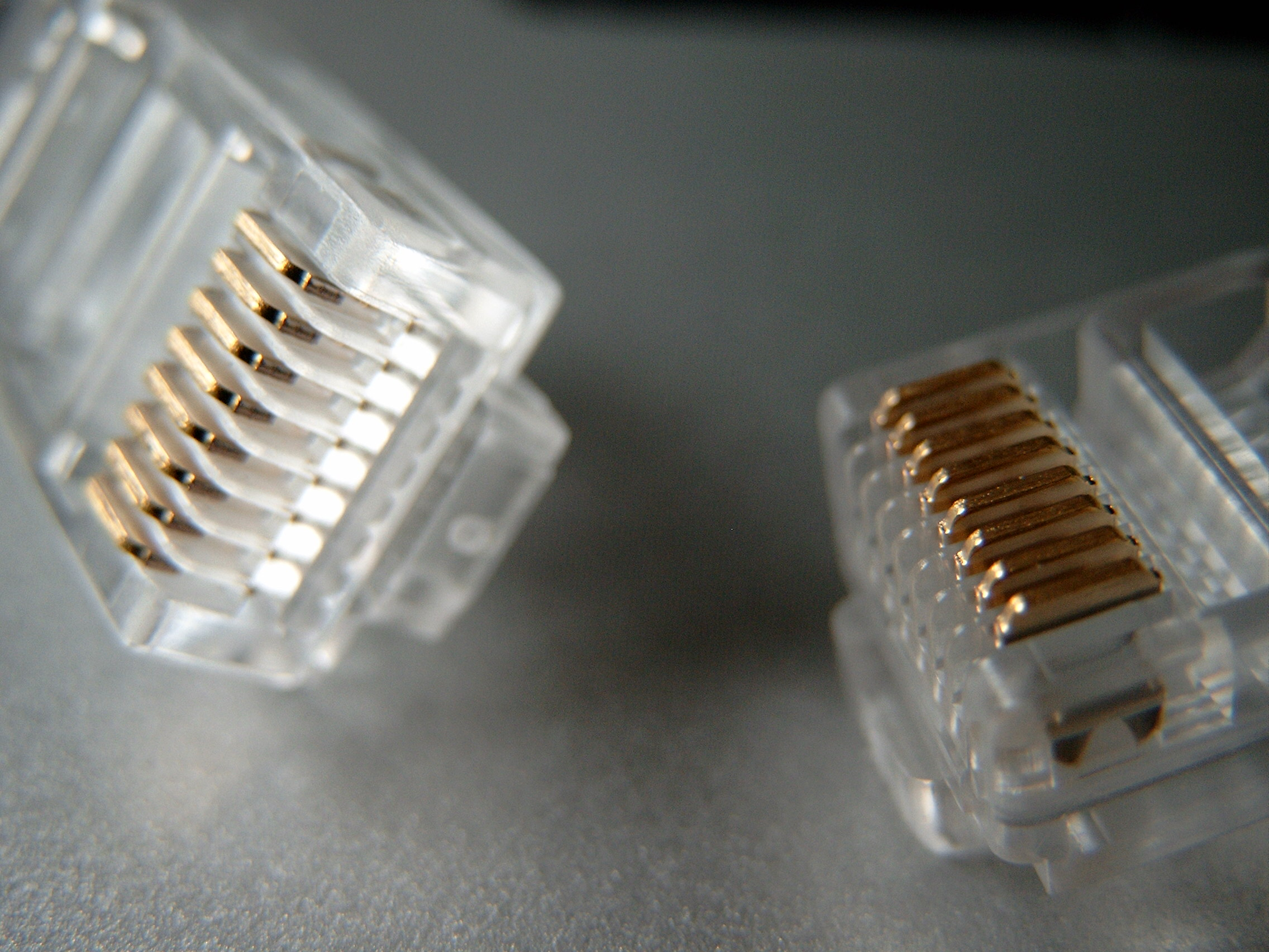 8P8C-Crimpstecker, ungeschirmt